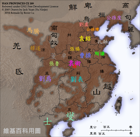 東漢末期191至192年群雄勢力分布圖